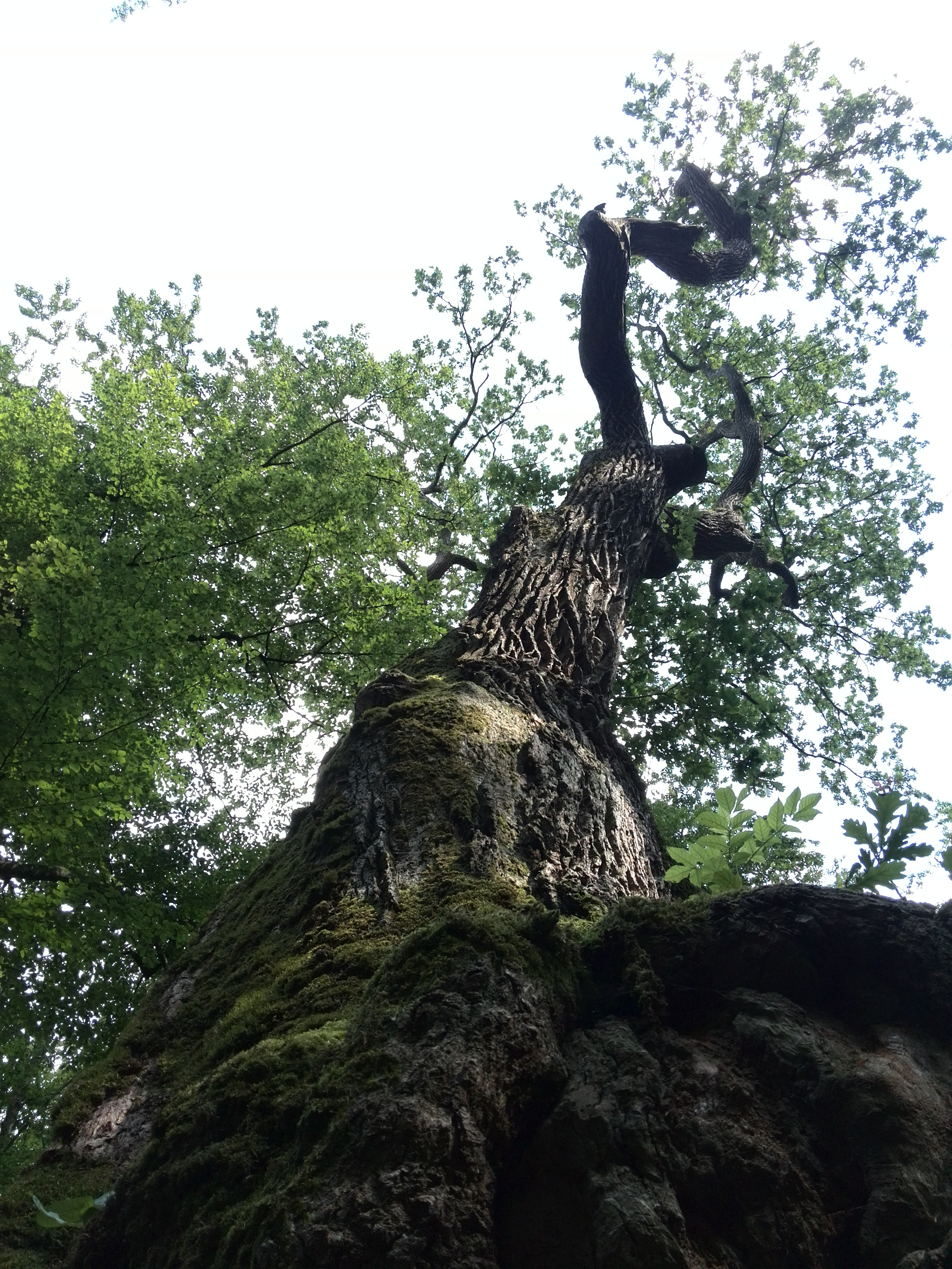 Zdjęcie przedstawia Dąb Bolesław widziany z dołu. Zostało wykonane 29 lipca 2015r. przez Nikodema Kaczmarka (Niko2002).